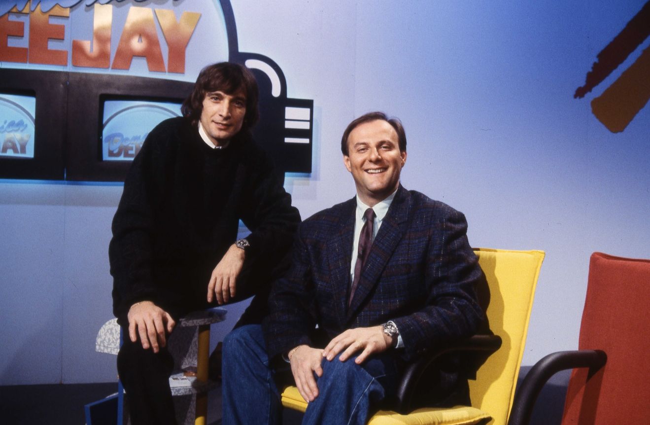 1986: Gerry Scotti con Claudio Cecchetto nello studio televisivo di Italia 1, in un momento di pausa della registrazione di Deejay Television